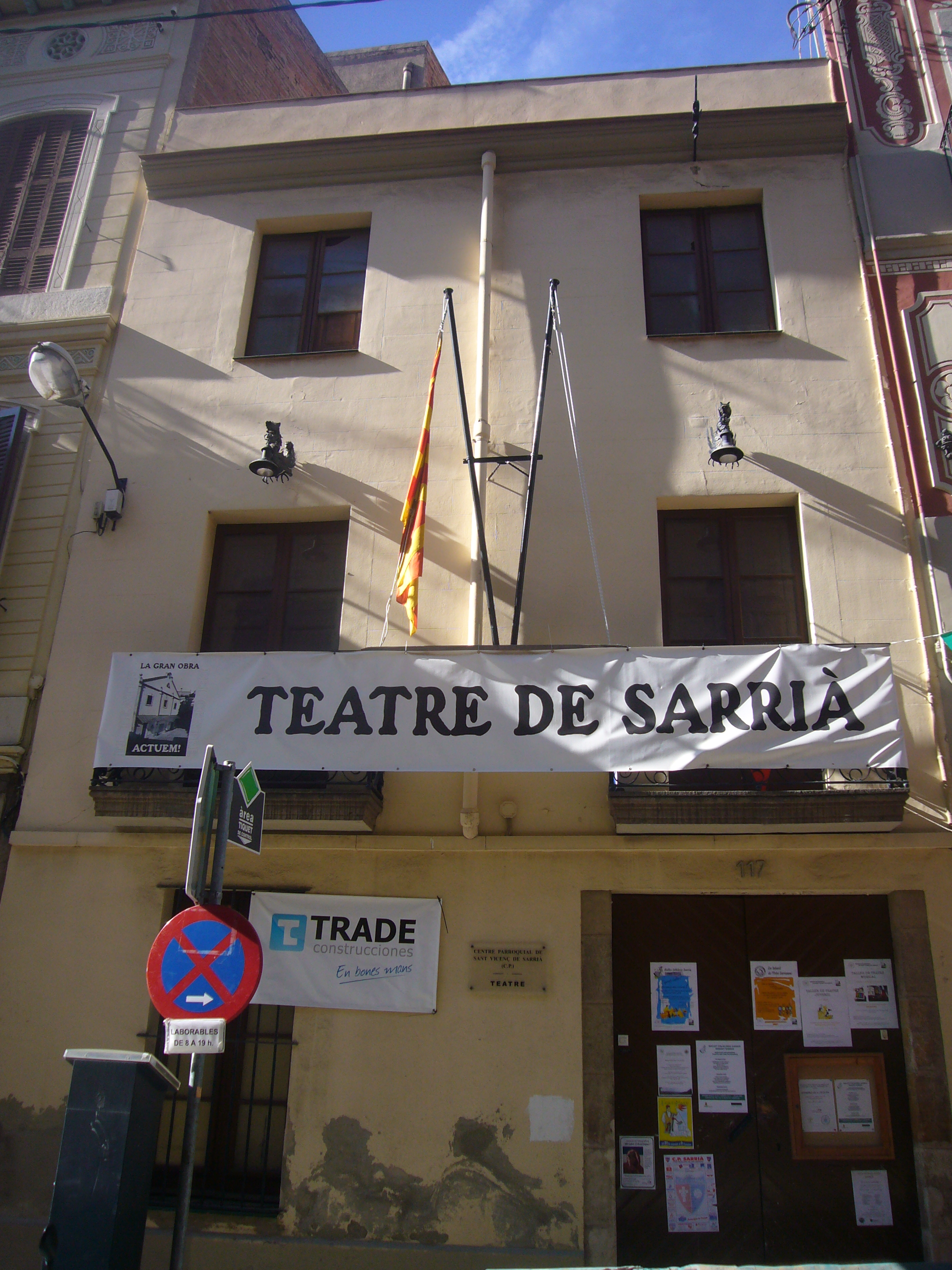 Edifici antic del Centre Parroquial de Sarrià i entrada històrica del Teatre de Sarrià, al carrer major de Sarrià, 117